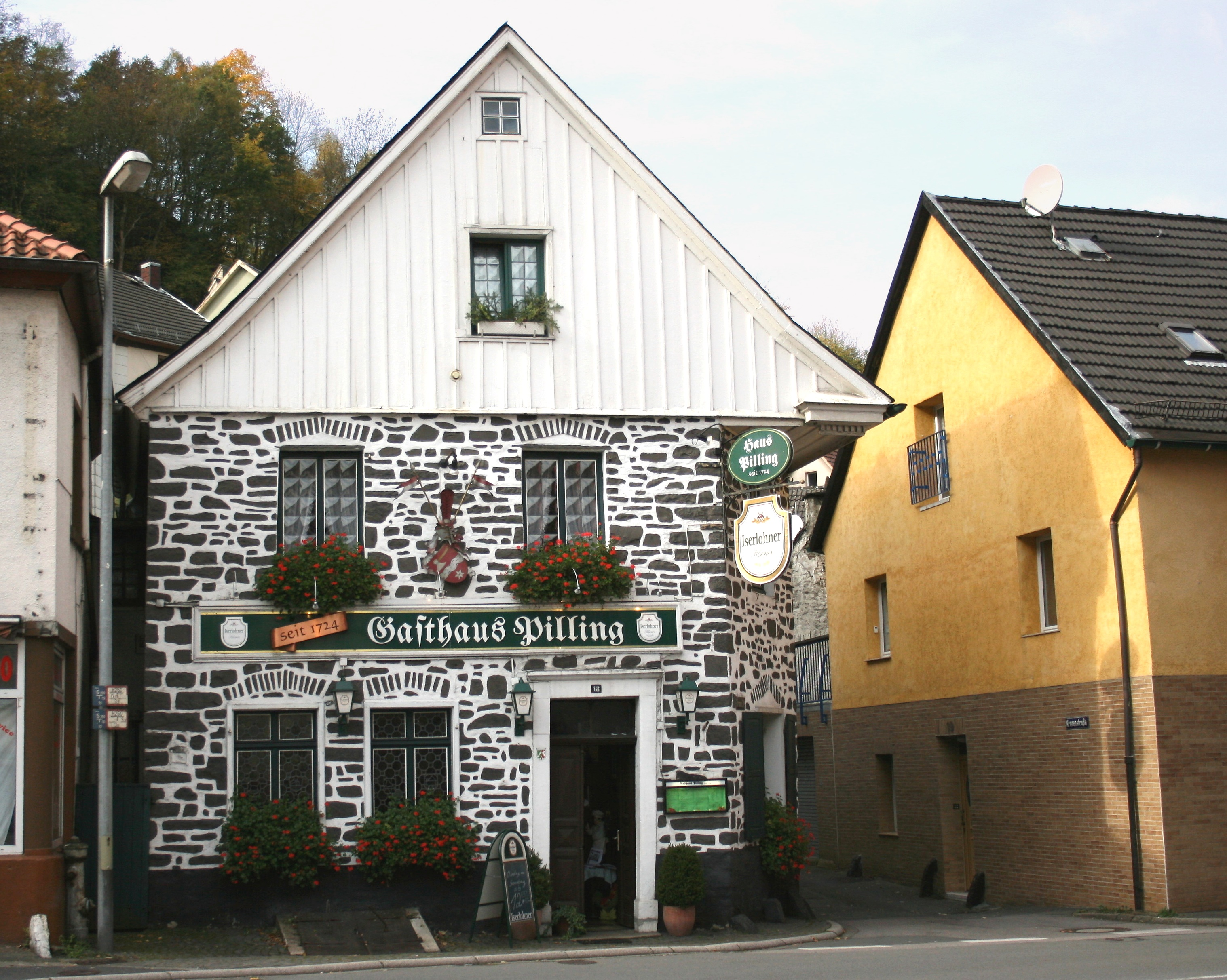 Gasthaus Pilling in Altena, Nettestraße 18.